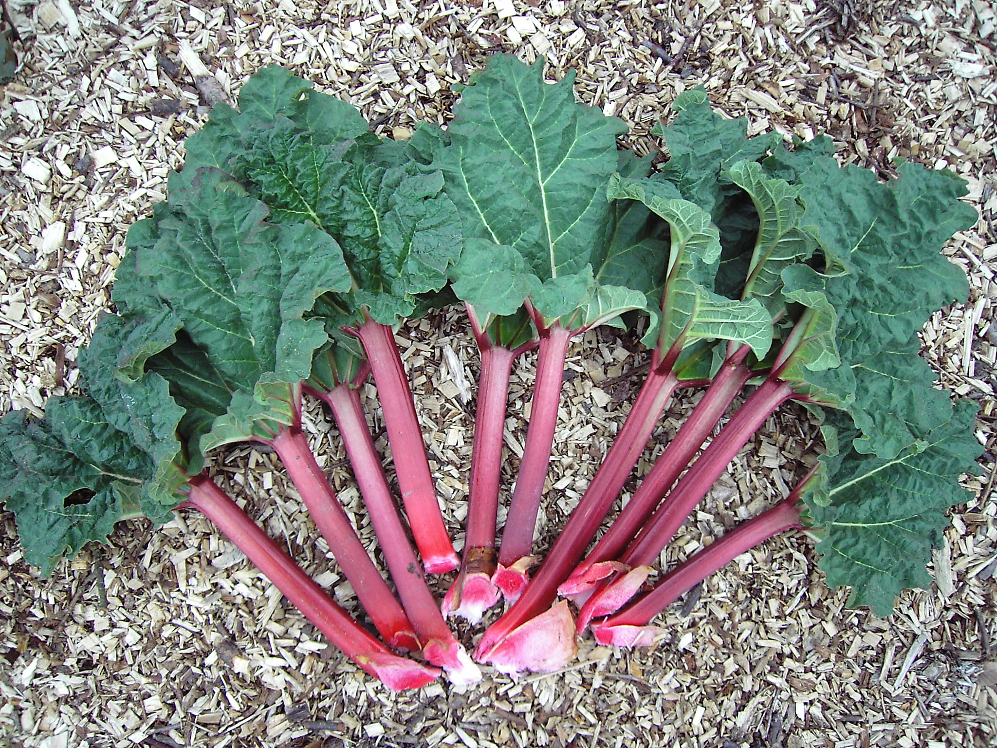 Rheum rhabarbarum leaves and shafts